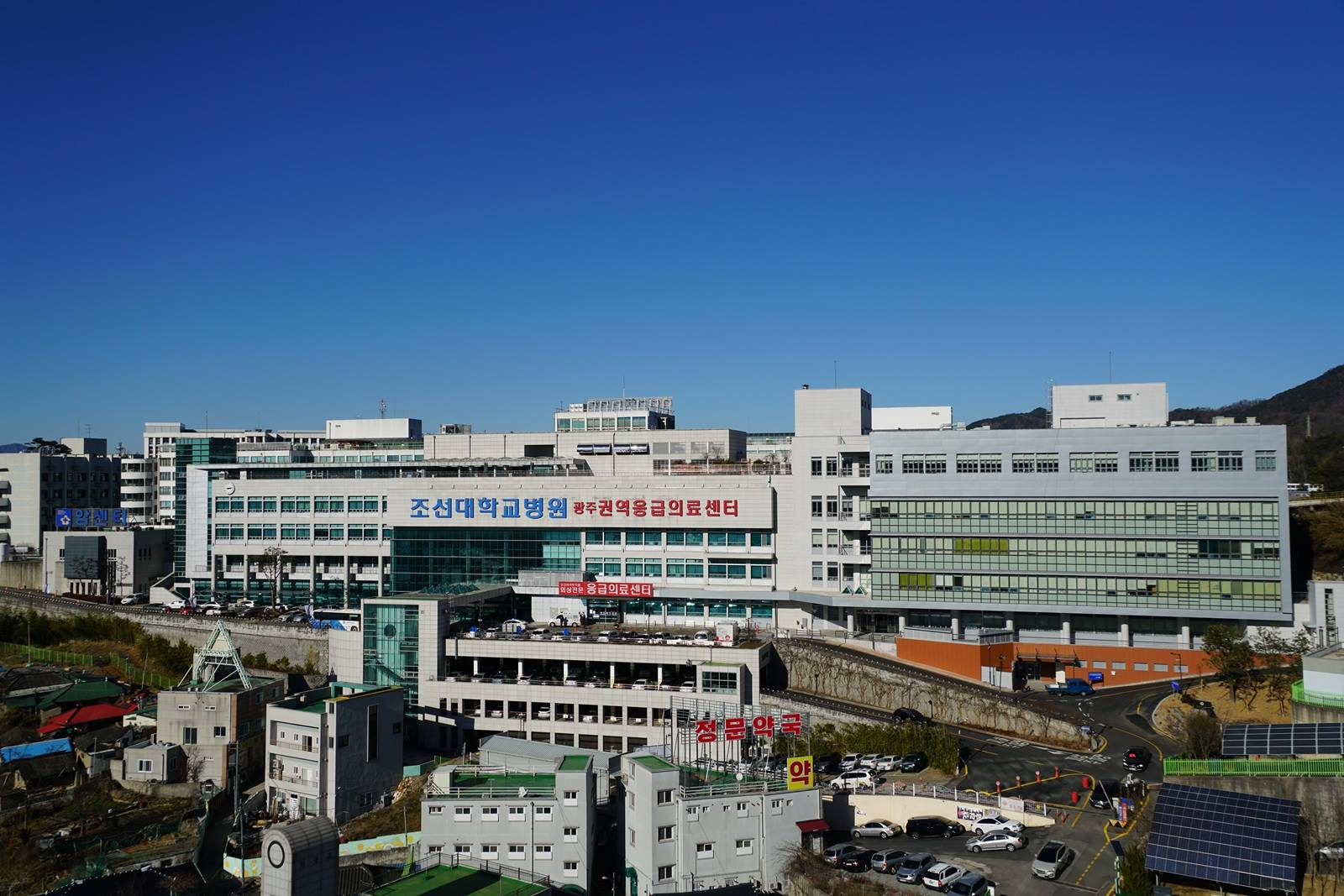 조선대학교병원 전경